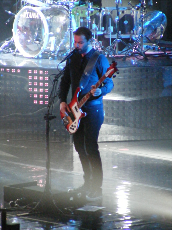 Wolstenholme leta 2007